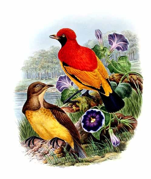 Sericulus aureus